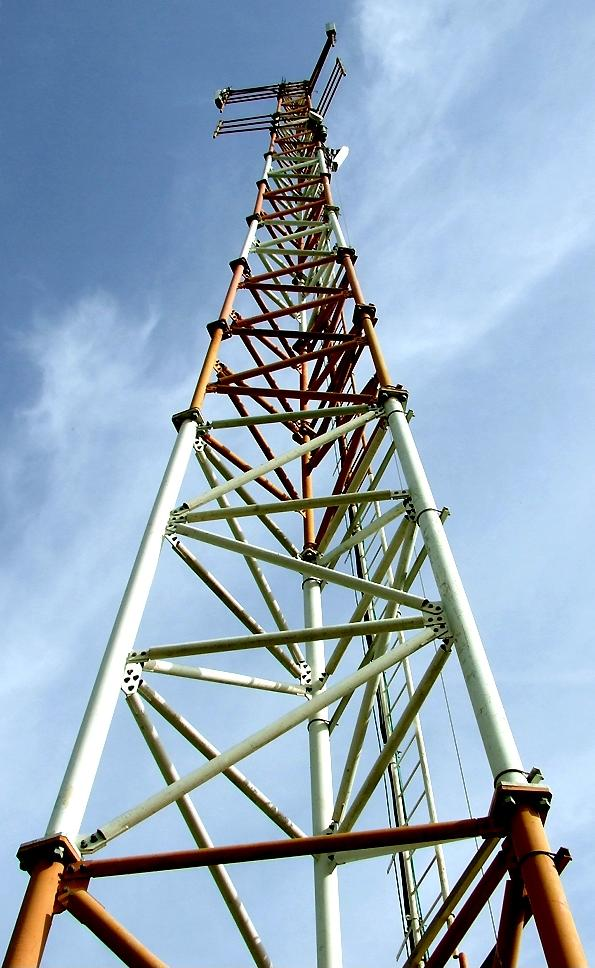 אנטנה סלולארית בישראל